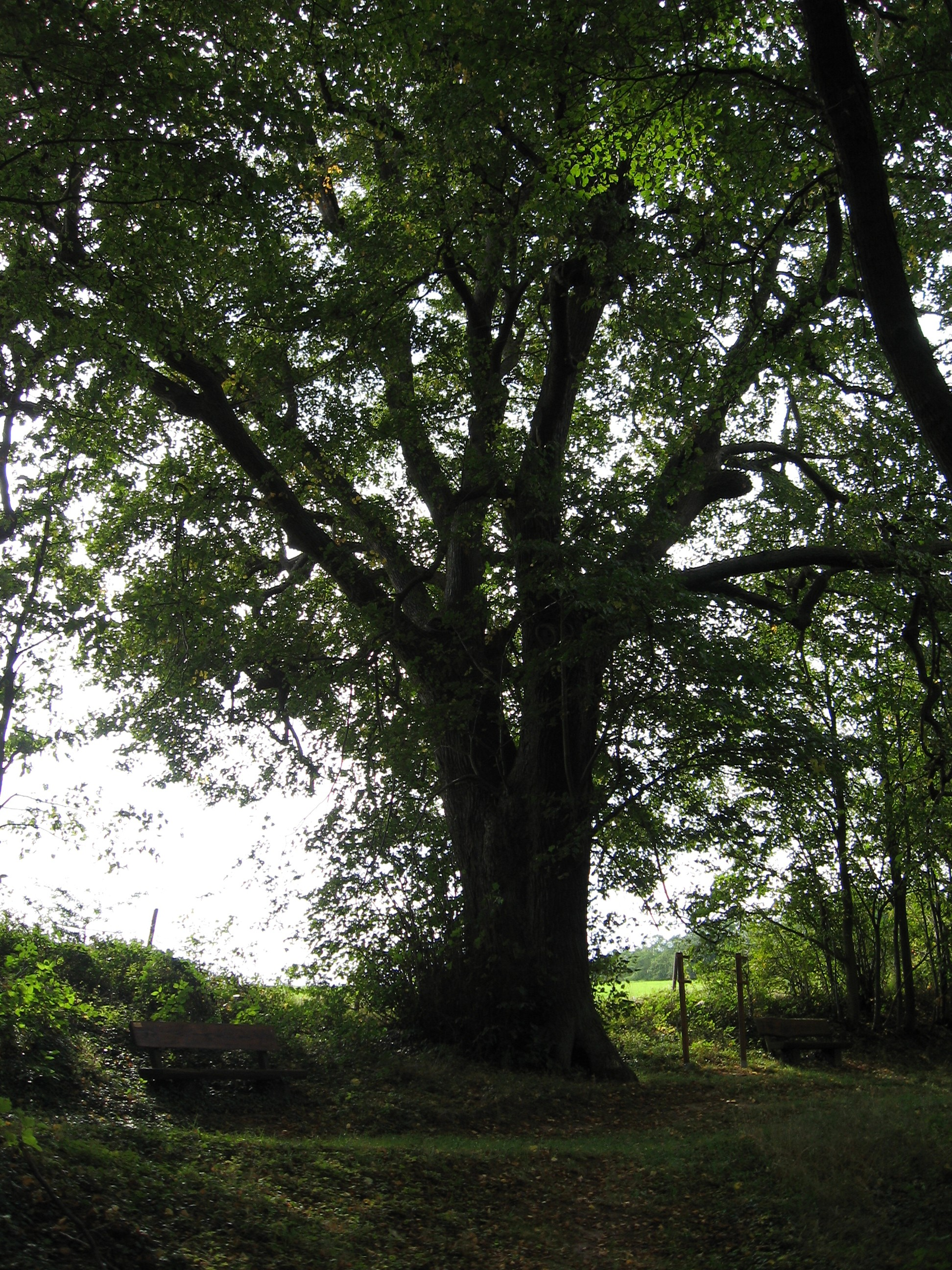 Naturdenkmal „Lescherlinde“ (ND-7135-381) in Cochem/Mosel